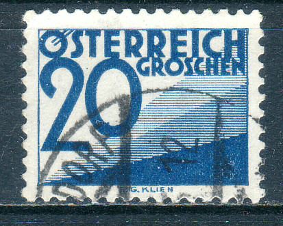 Beschreibung: Portomarke von Österreich von 1925 Quelle: Marke aus eigener Sammlung selbst fotografiert Fotograf: Thomas Schmidtkonz